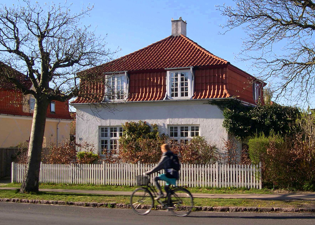 Den Gvide By, a building society development for workers at Frederiksberg Gasworks in Frederiksberg, Copenhagen, Denmark